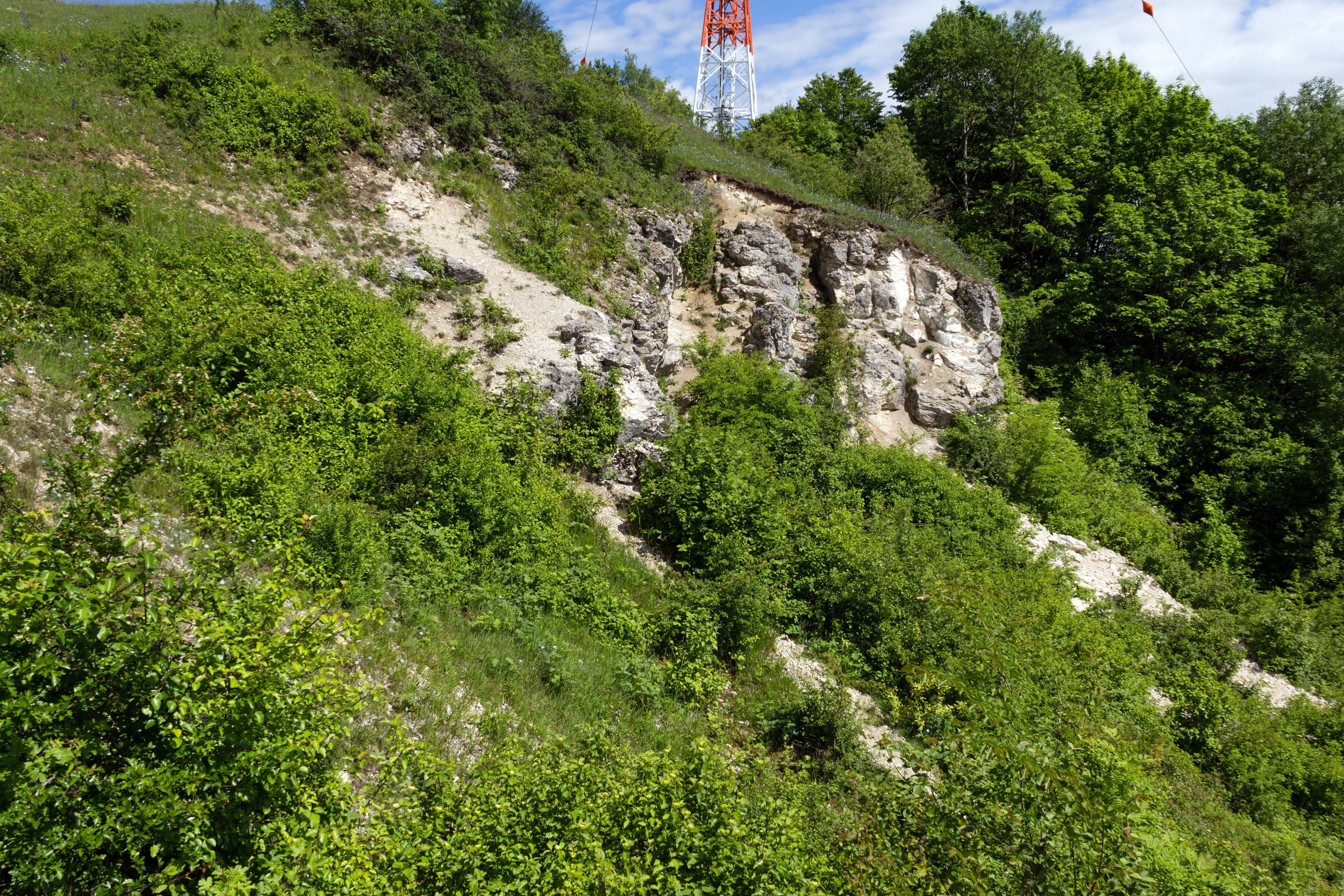 Steinbruch Hesselberg, Geotop, Landschaftsschutzgebiet Schutzzone im Naturpark Altmühltal